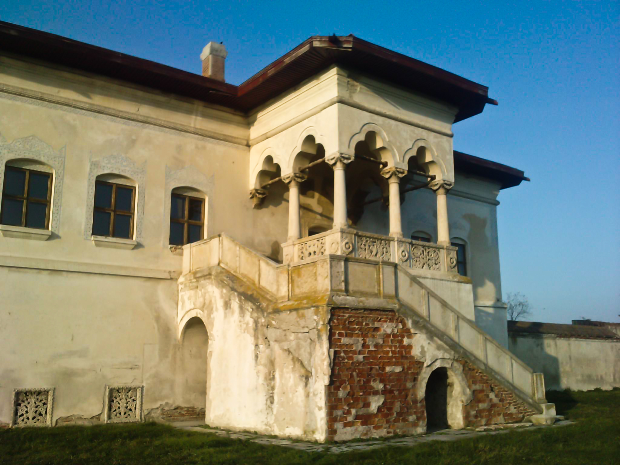 Palat potlogi vedere din fata 03